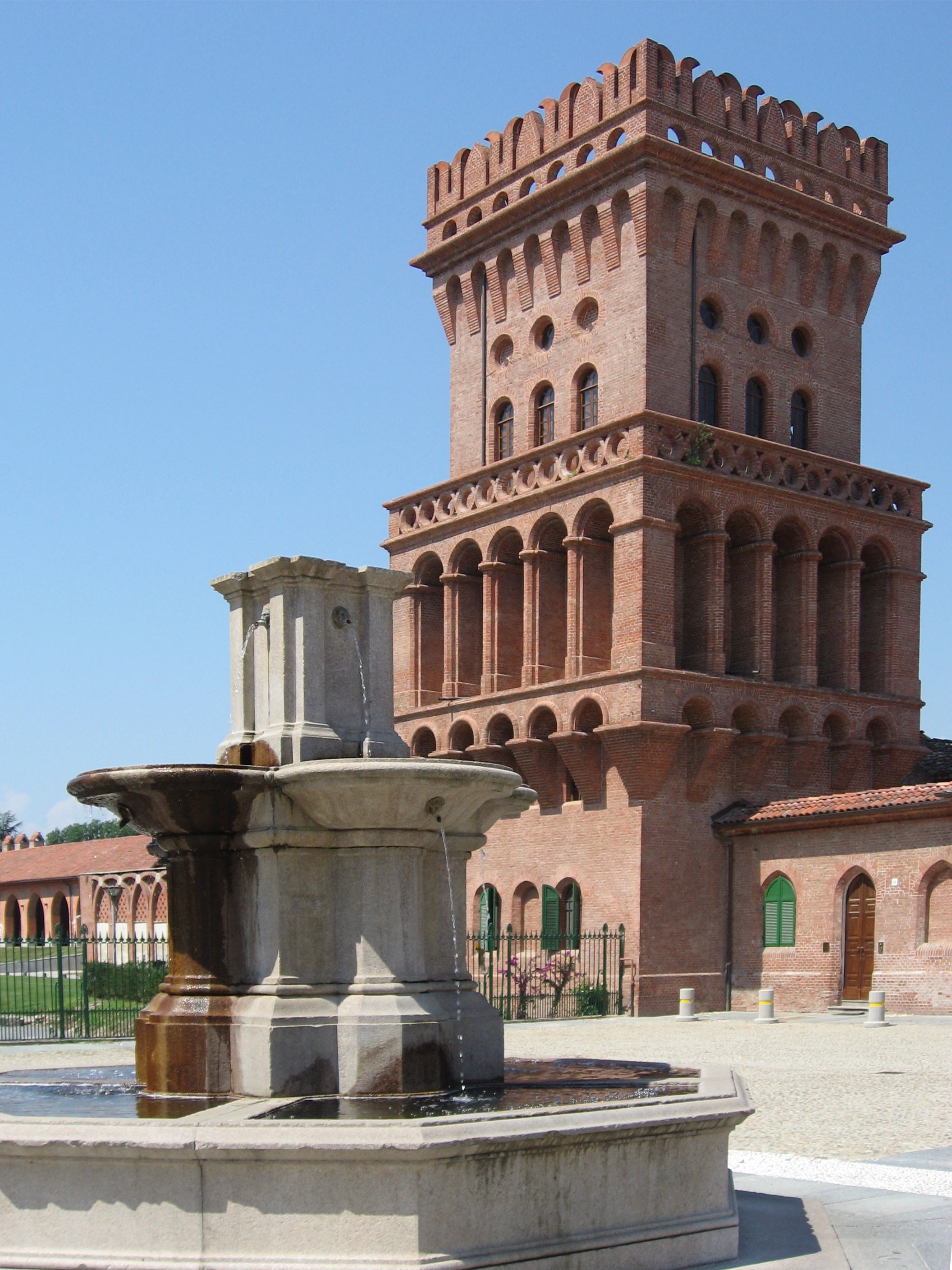 Tower in Pollenzo (Provincia di Cuneo, Piemonte, Italy)